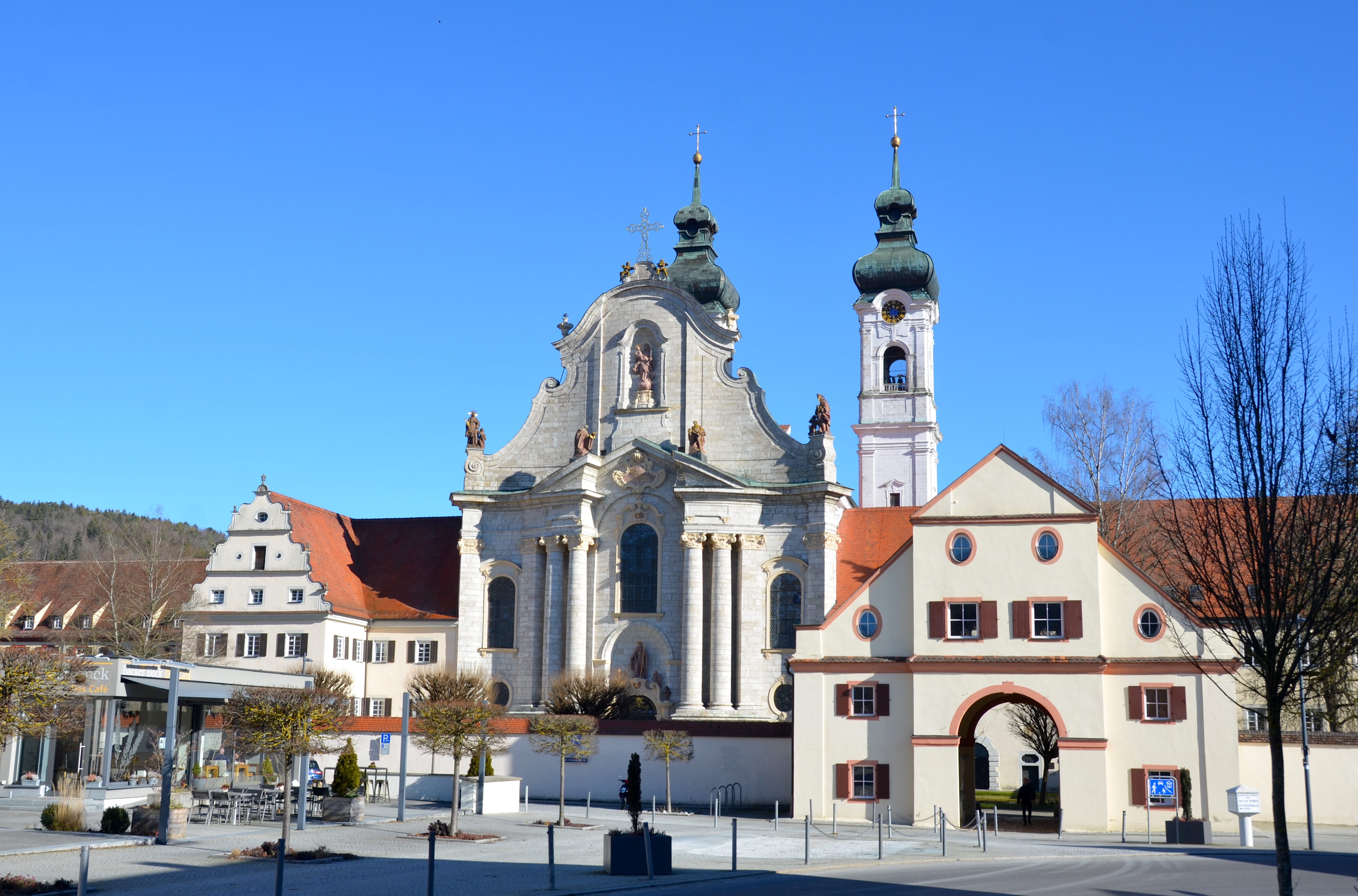 Münster Unserer Lieben Frau in Zwiefalten (Baden-Württemberg)